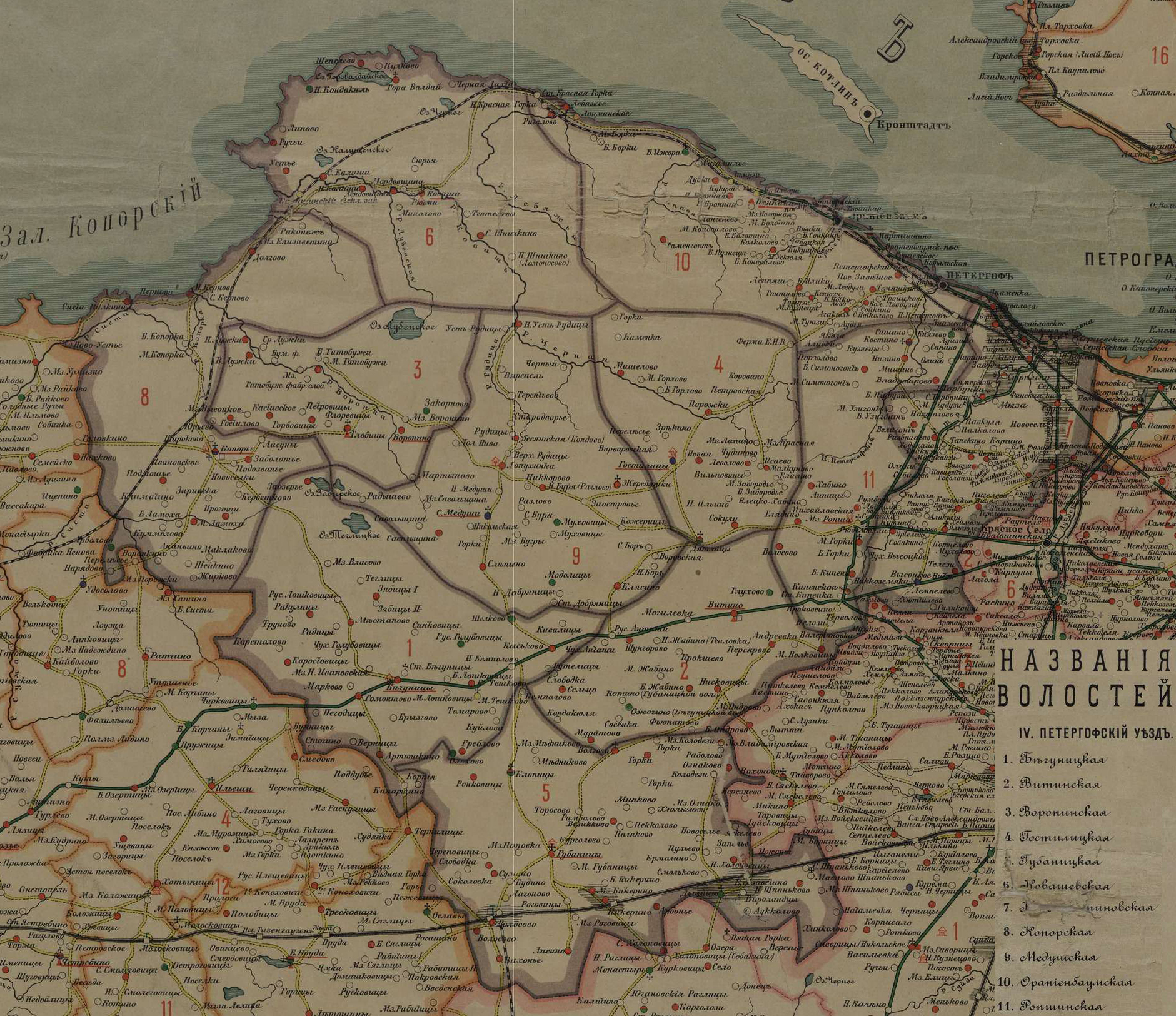 Петергофский уезд с разделением на волости на карте Петроградской губернии 1916 года.